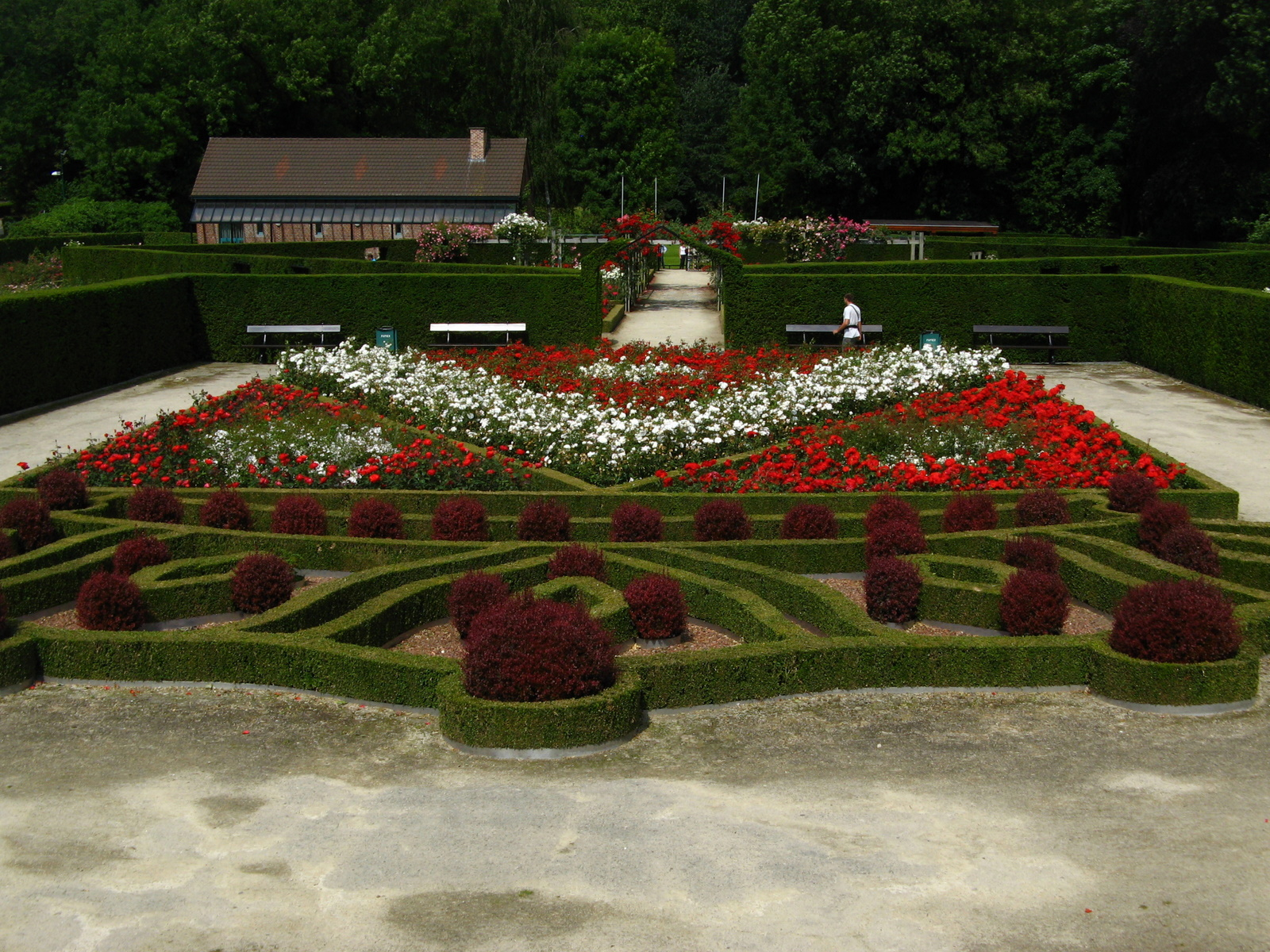 Coloma rose garden